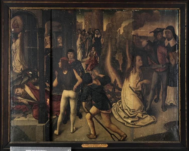 Martyre de sainte Agnès